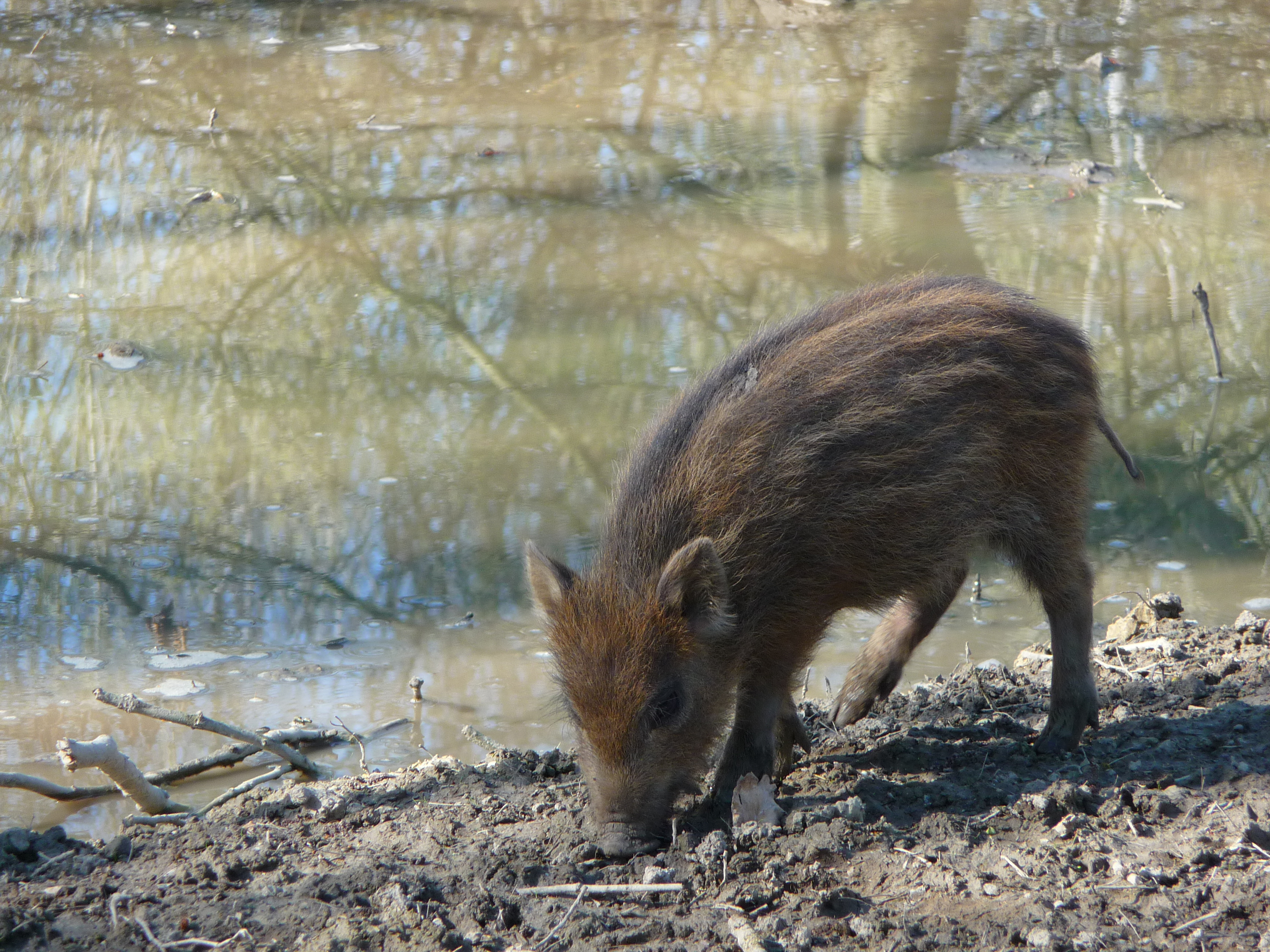 Frischling eines Wildschweins (Sus scrofa)